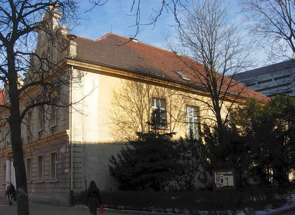 Budynek Gdańska 4 - dawny klasztor klarysek, od 1945 r. siedziba Muzeum Okręgowego